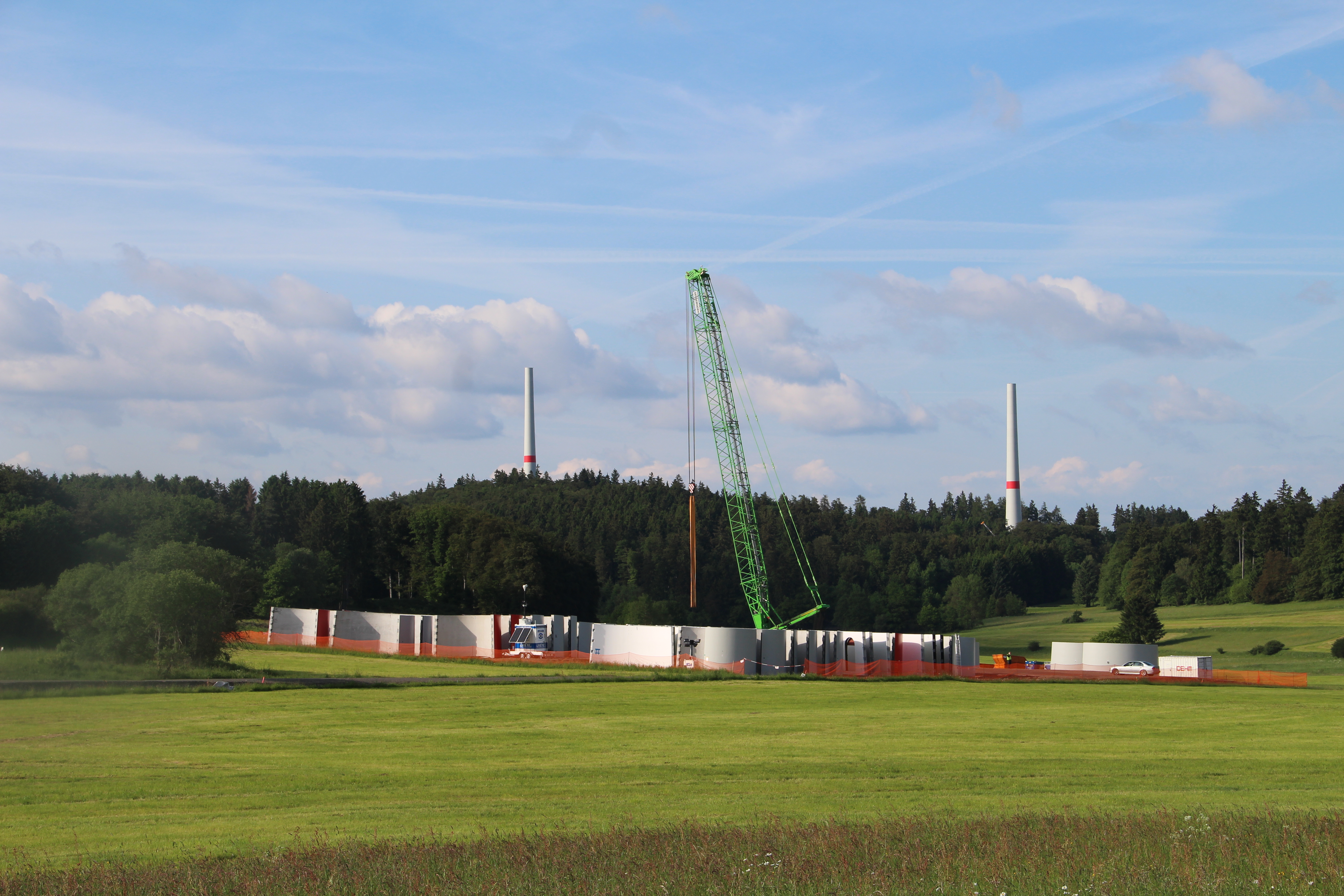 Baustelle eines Windrads an der Landstraße 3049 zwischen Bottenhorn und Steinperf. Im Hintergrund zwei Stümpfe von ebenfalls im Bau befindlichen Windrädern.